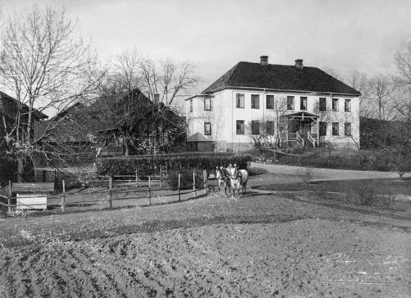 Søndre Bjølsen gård, bolighus, åker, hester2, uthus, hage. Søndre Bjølsen gård er fotografert fra de senere Hjemmets kolonihager. Da bildet tas i 1906 lever fortsatt eieren - Jørgen Meinich, som eide gården og bodde her fra 1852 til sin død i 1911. Her bodde også nevøen i en periode - den senere statsminister Jens Bratlie. Rett bak hestene, og tvers over bildet, går i dag Sarpsborggata.